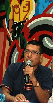 mi foto